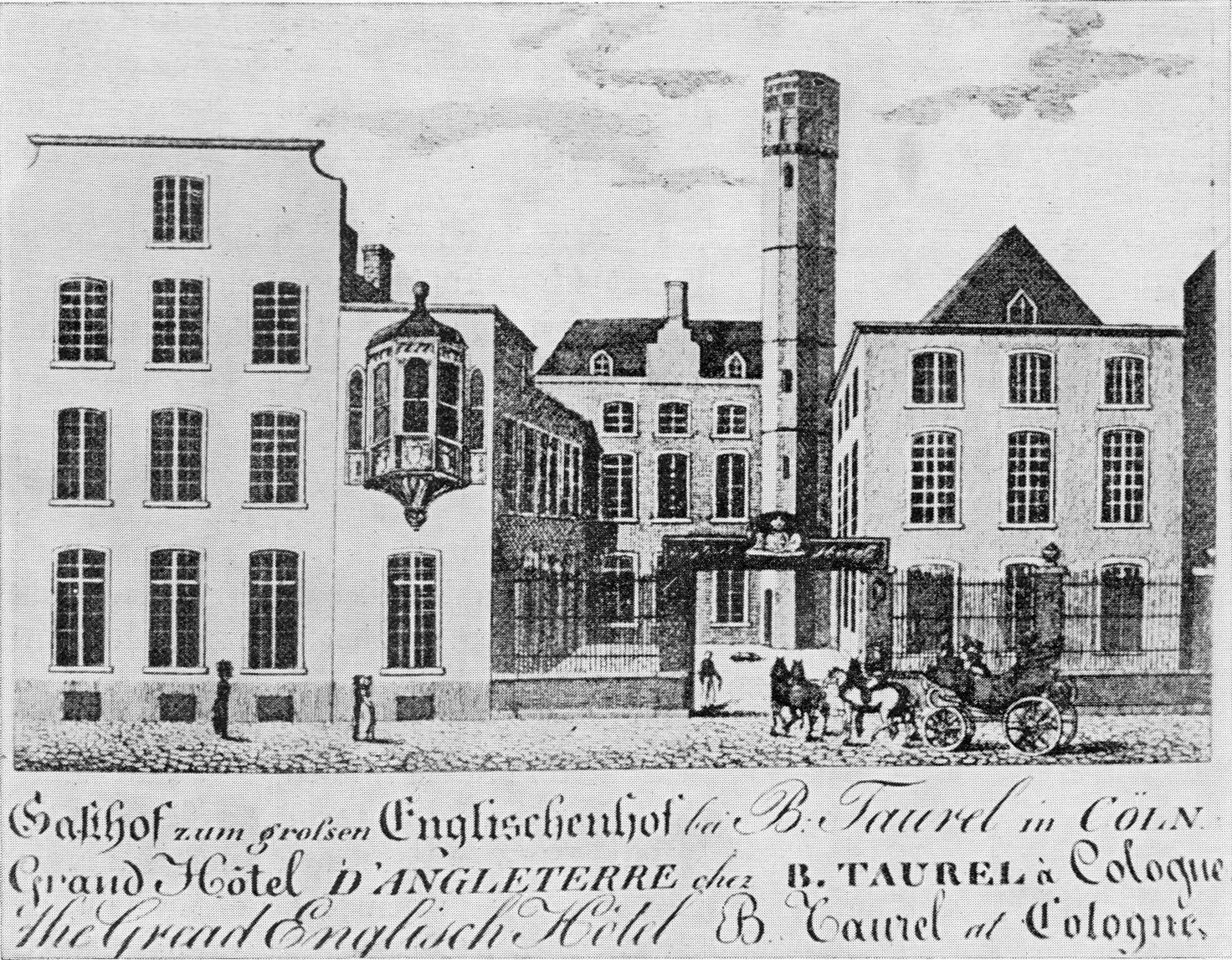 Abbildung Köln, Neumarkt 10, Englischer Hof. Adresskarte von 1822